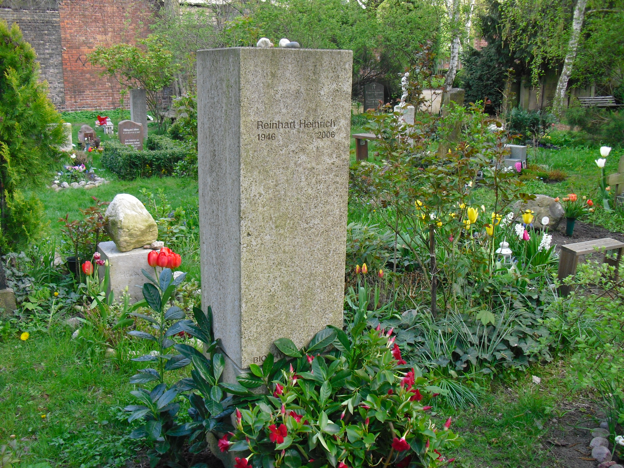 Grabstein für den Biophysiker Reinhart Heinrich auf dem Neuen Friedhof St. Marien-St. Nikolai in Berlin-Prenzlauer Berg